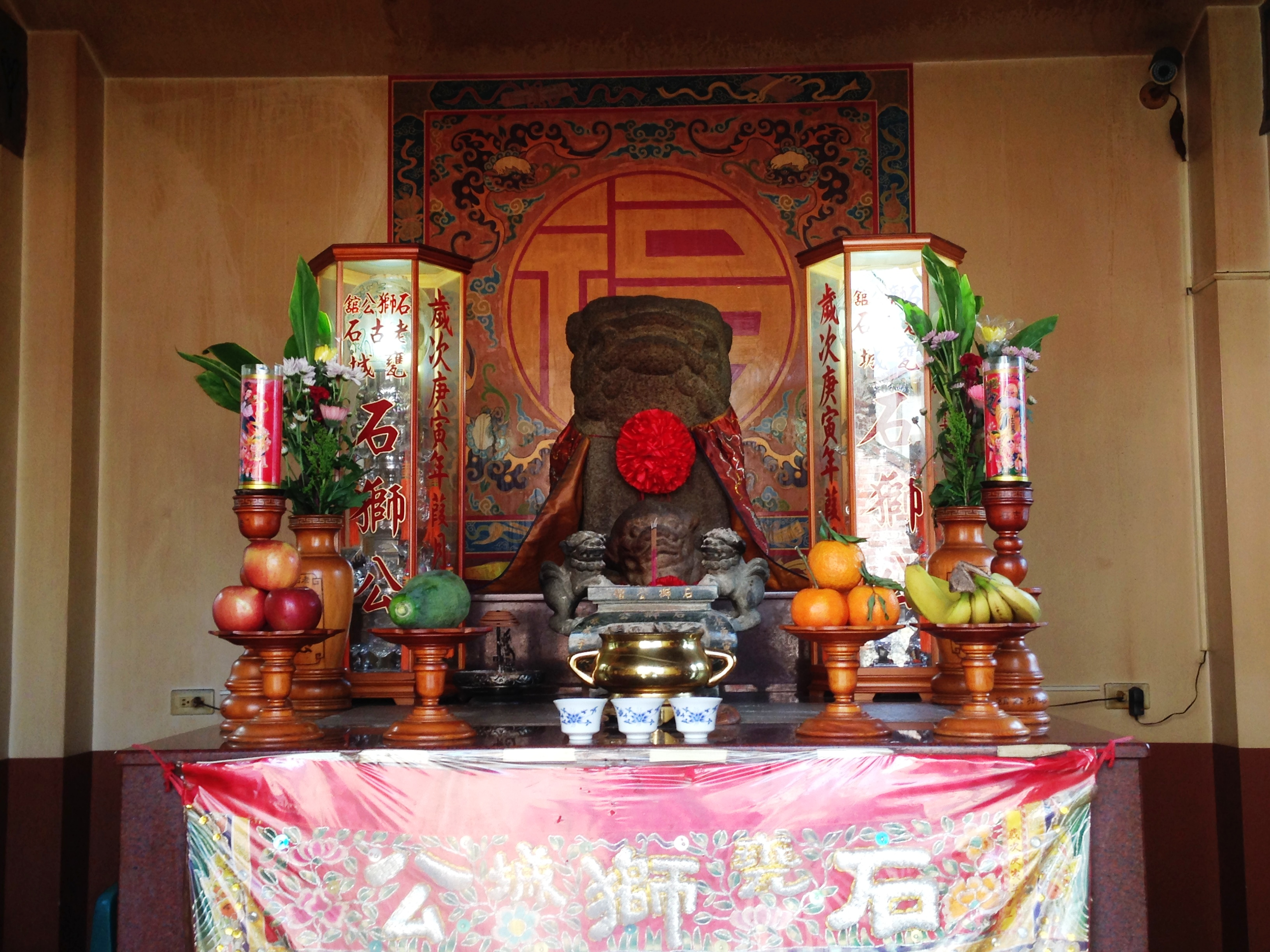 中文（台灣）: 甕城石獅公